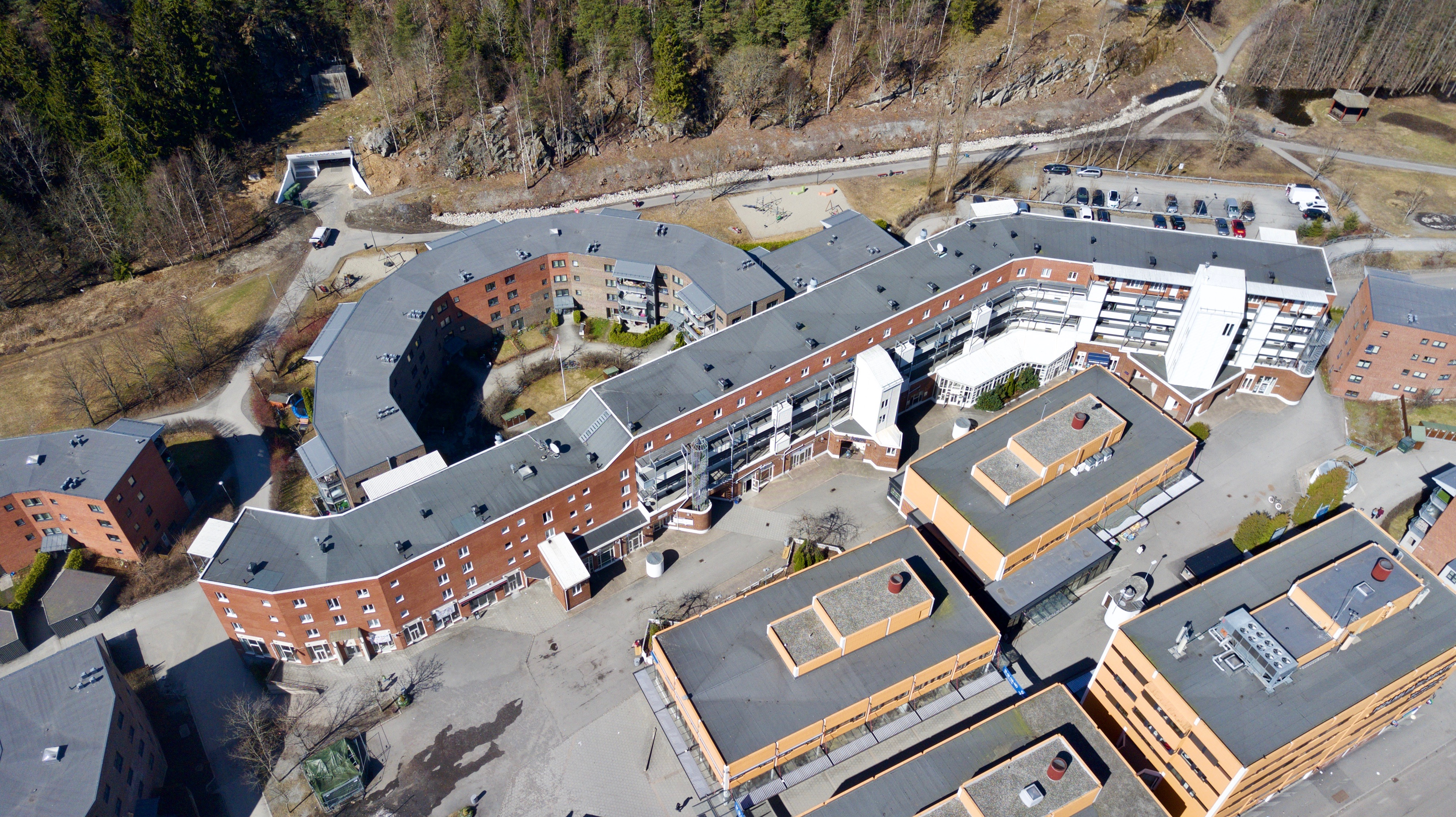 Holmlia senter og Holmlia senter vei. Oslo.